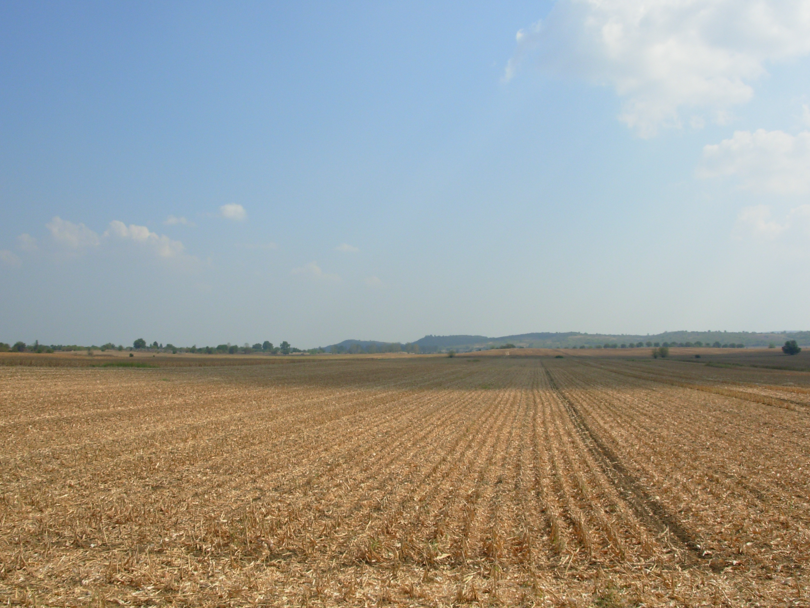 Поле в местността "Чадъре", с. Ново село, област Видин